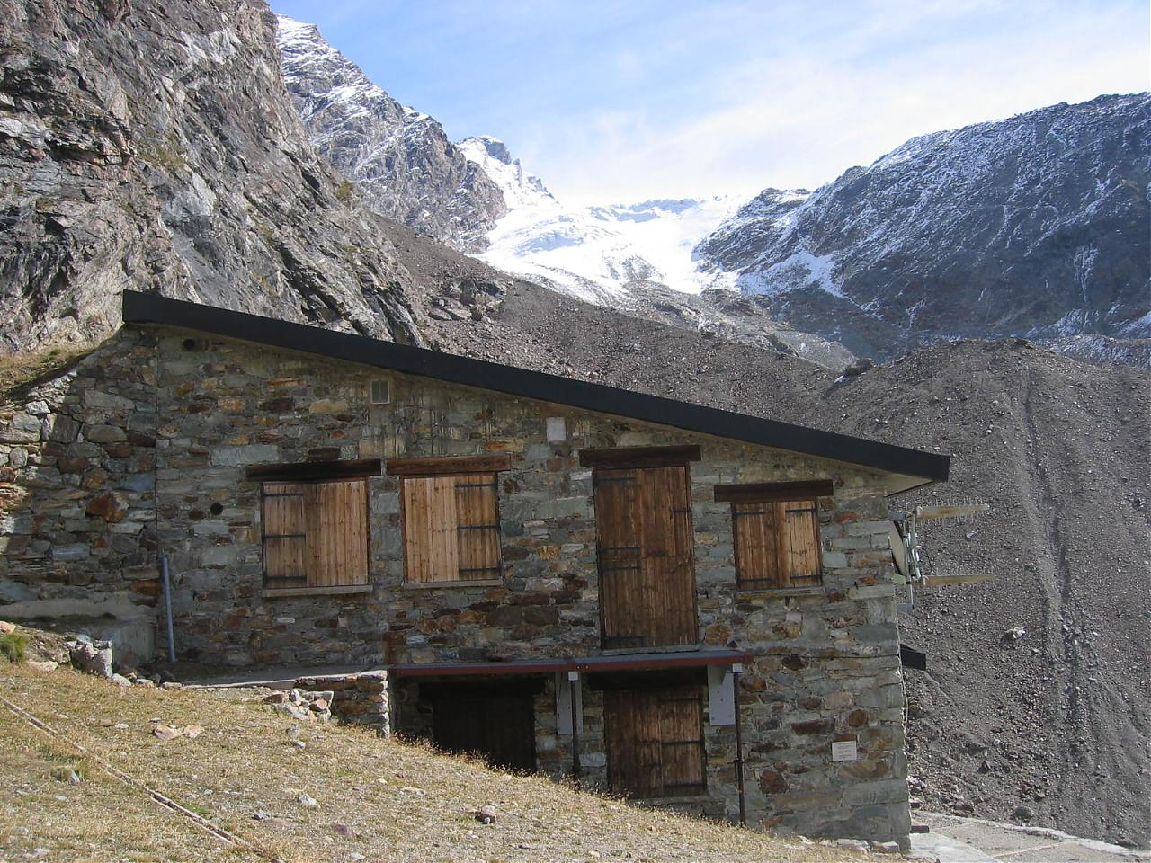 Il Rifugio Aosta dopo la chiusura invernale (2008)